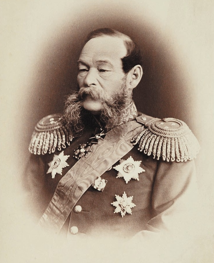 Фотография Николая Николаевича Муравьёва-Амурского. Санкт-Петербург, фотоателье Р. Бейера. Конец XIX в. Размер 165 х 109 мм